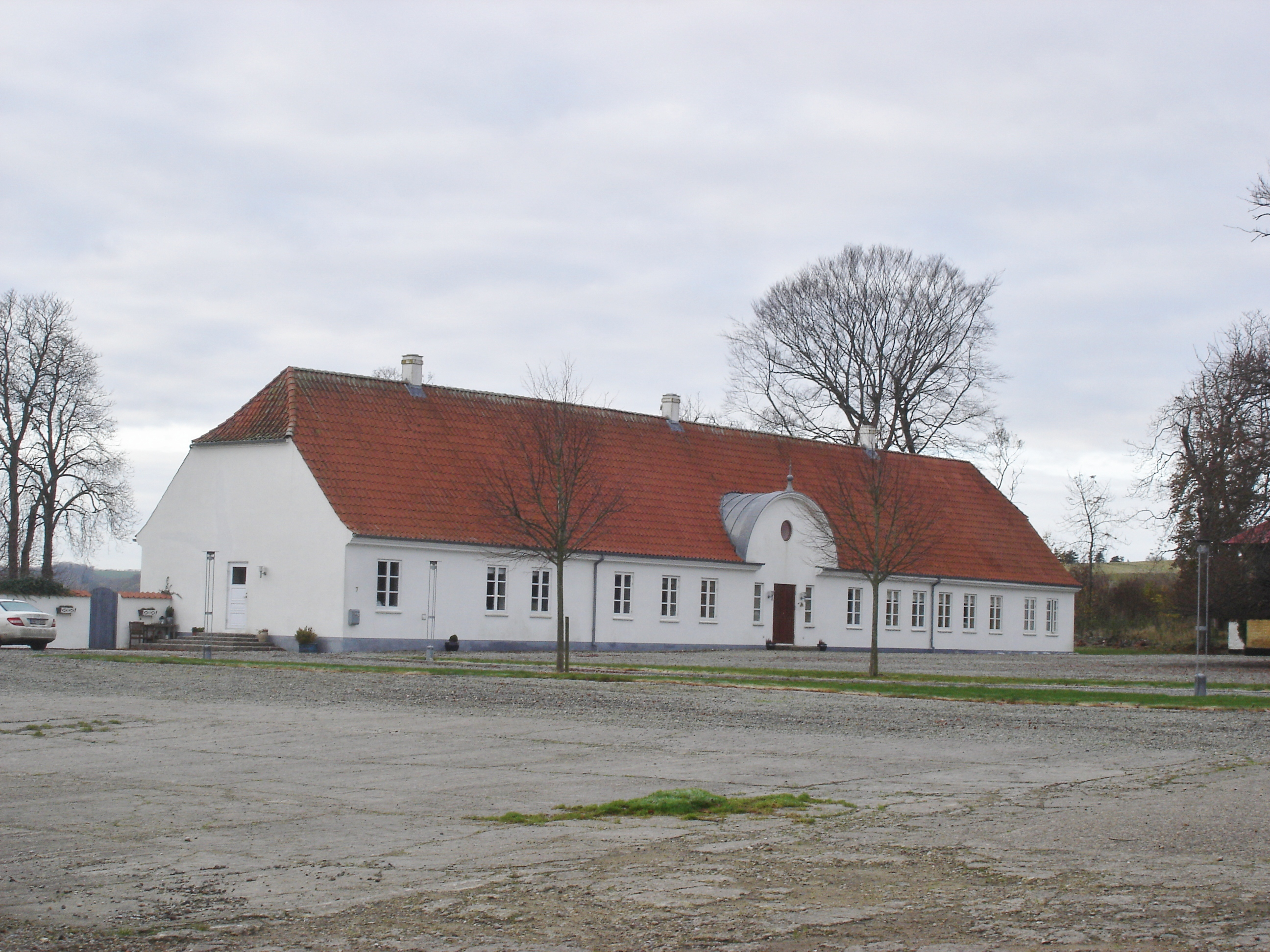 Herregården Louisendal mellem Gudumholm og Vaarst